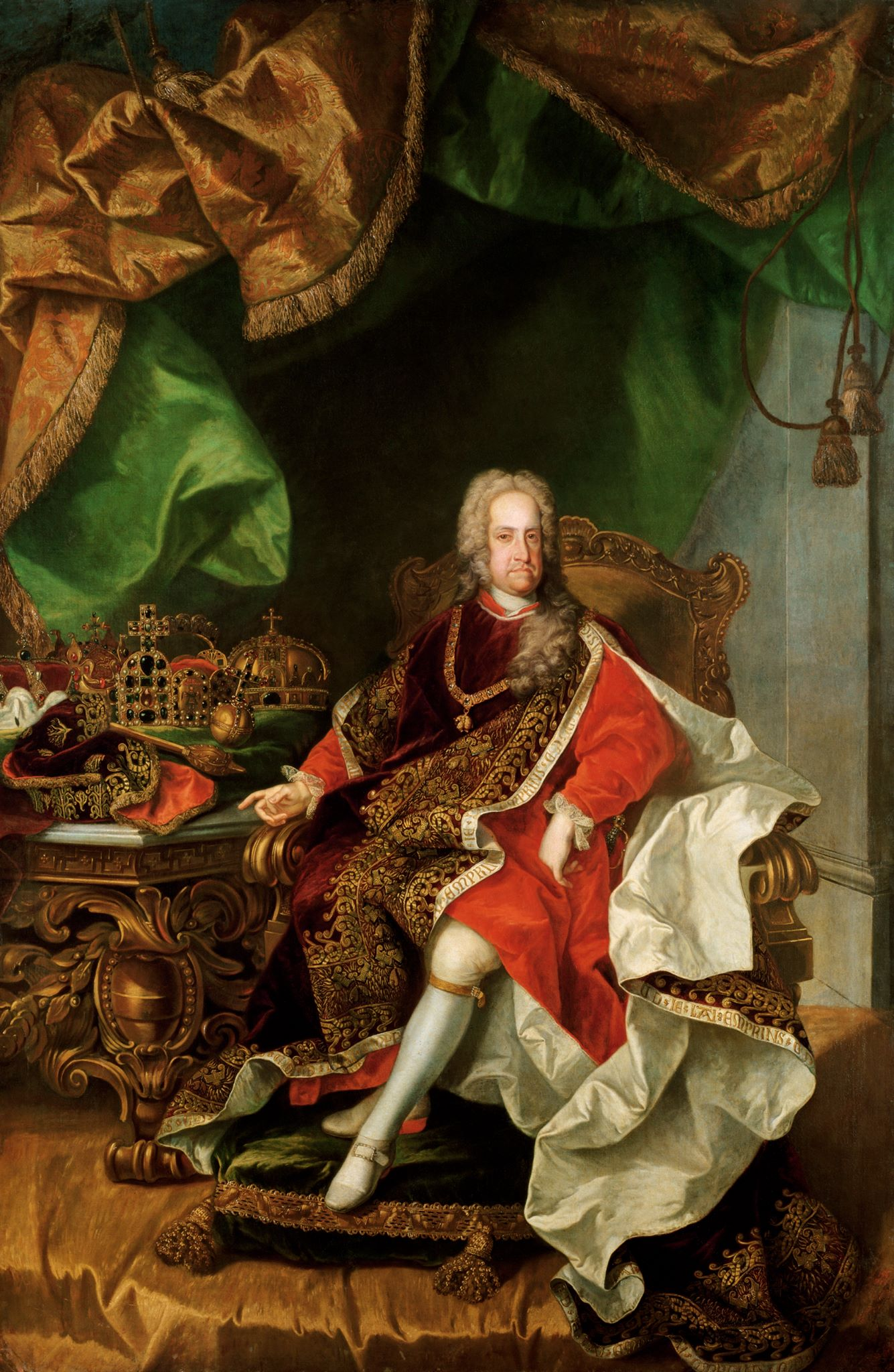 Kaiser Karl VI. (1685-1740) im Vliesornat. Wien